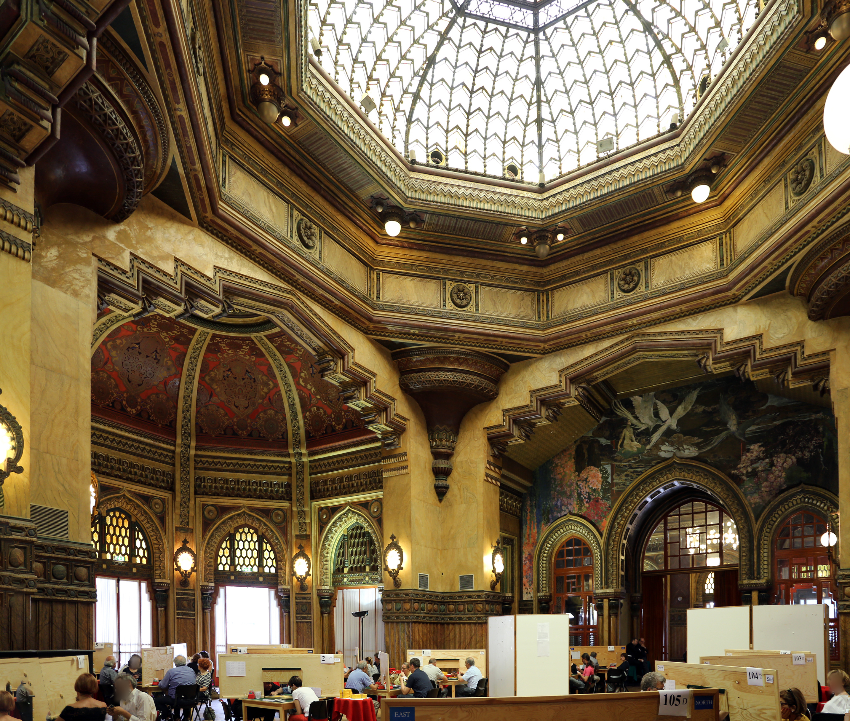 Palazzo dei Congressi (Salsomaggiore Terme) This is a photo of a monument which is part of cultural heritage of Italy.